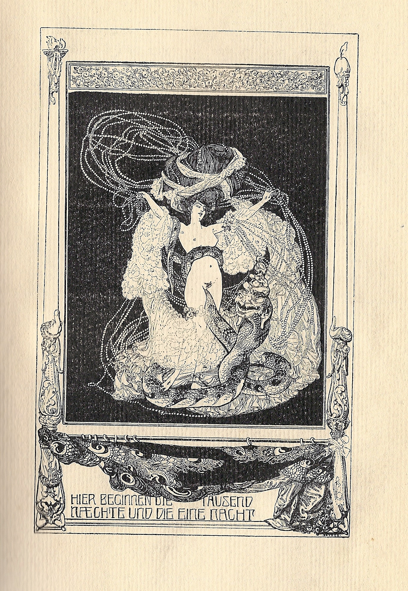 "Hier beginnen die Tausend Nächte und die eine Nacht" - Zwischentitel von Choisy le Conin [d.i. Franz von Bayros]